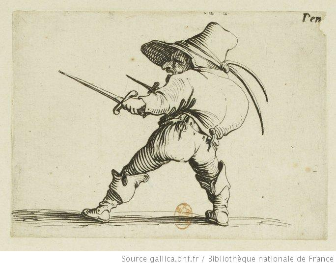 Les Gobbi]. [8], [Le duelliste à l'épée et au poignard] : [estampe] / Auteur : Callot, Jacques (1592-1635). Graveur Éditeur : [s.n.] (Nancy) Date d'édition : 1621-1625 Format : 1 est. : eau-forte et burin ; 6,2 x 8,5 cm